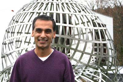 Foto di Salil Vadhan